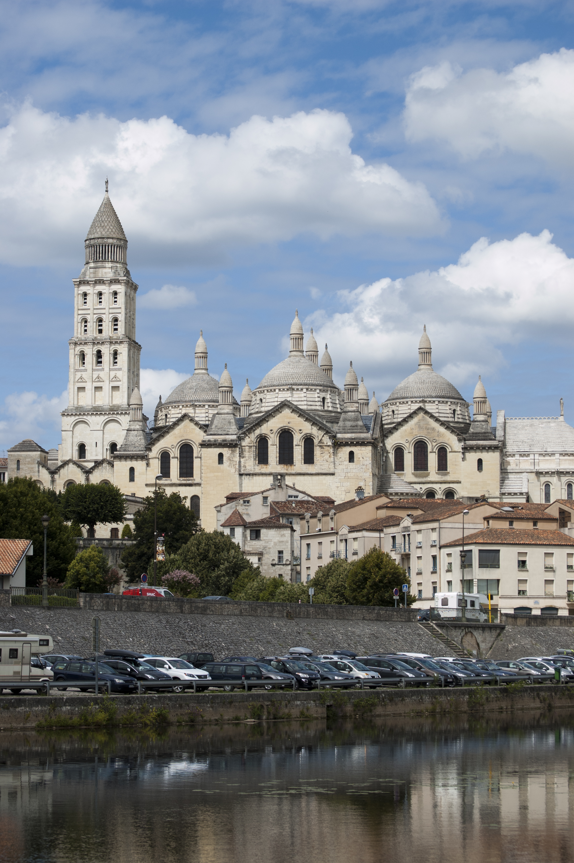 Kathedraal Sint-Front Perigueux.